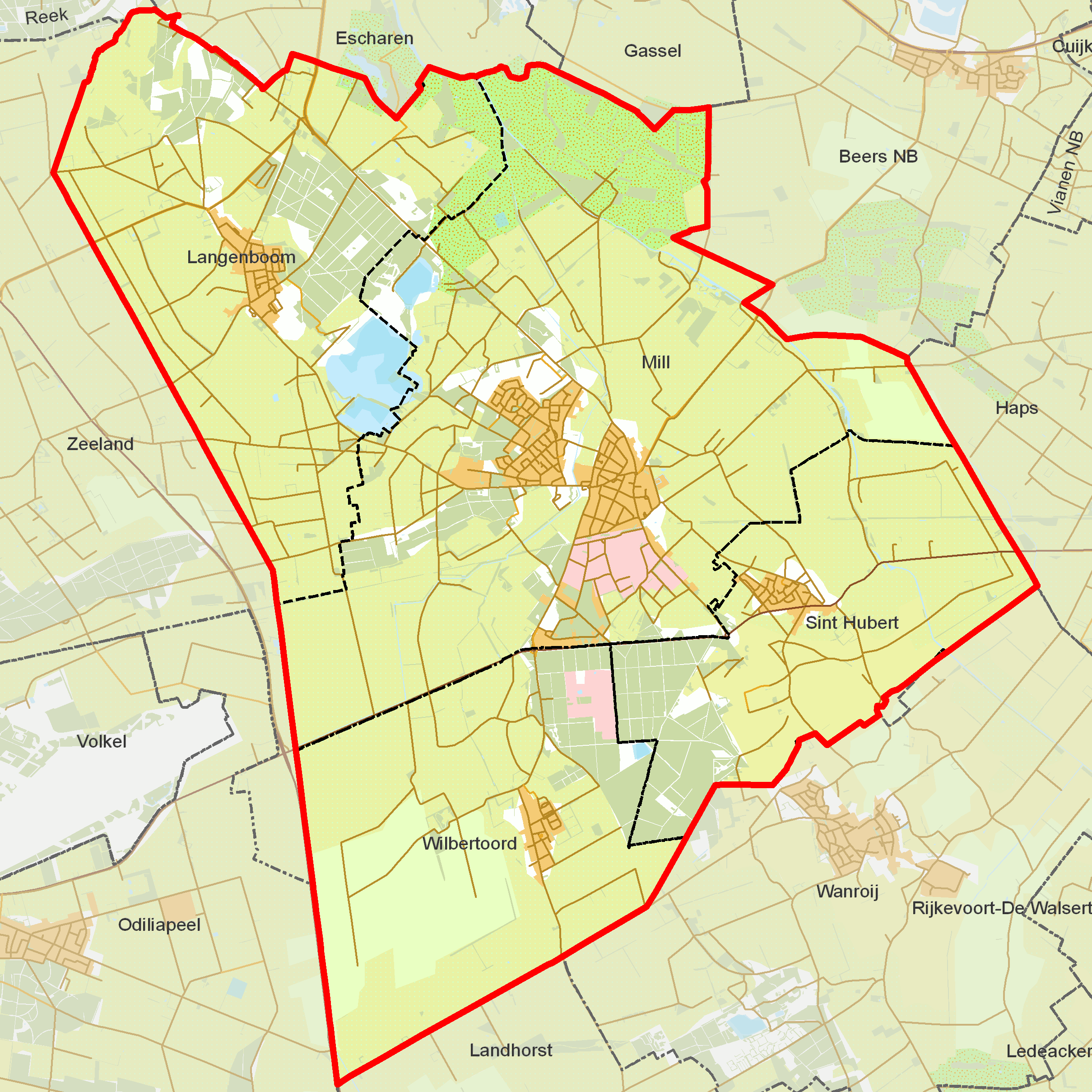 BAG woonplaatsen - Gemeente Mill en Sint Hubert.png